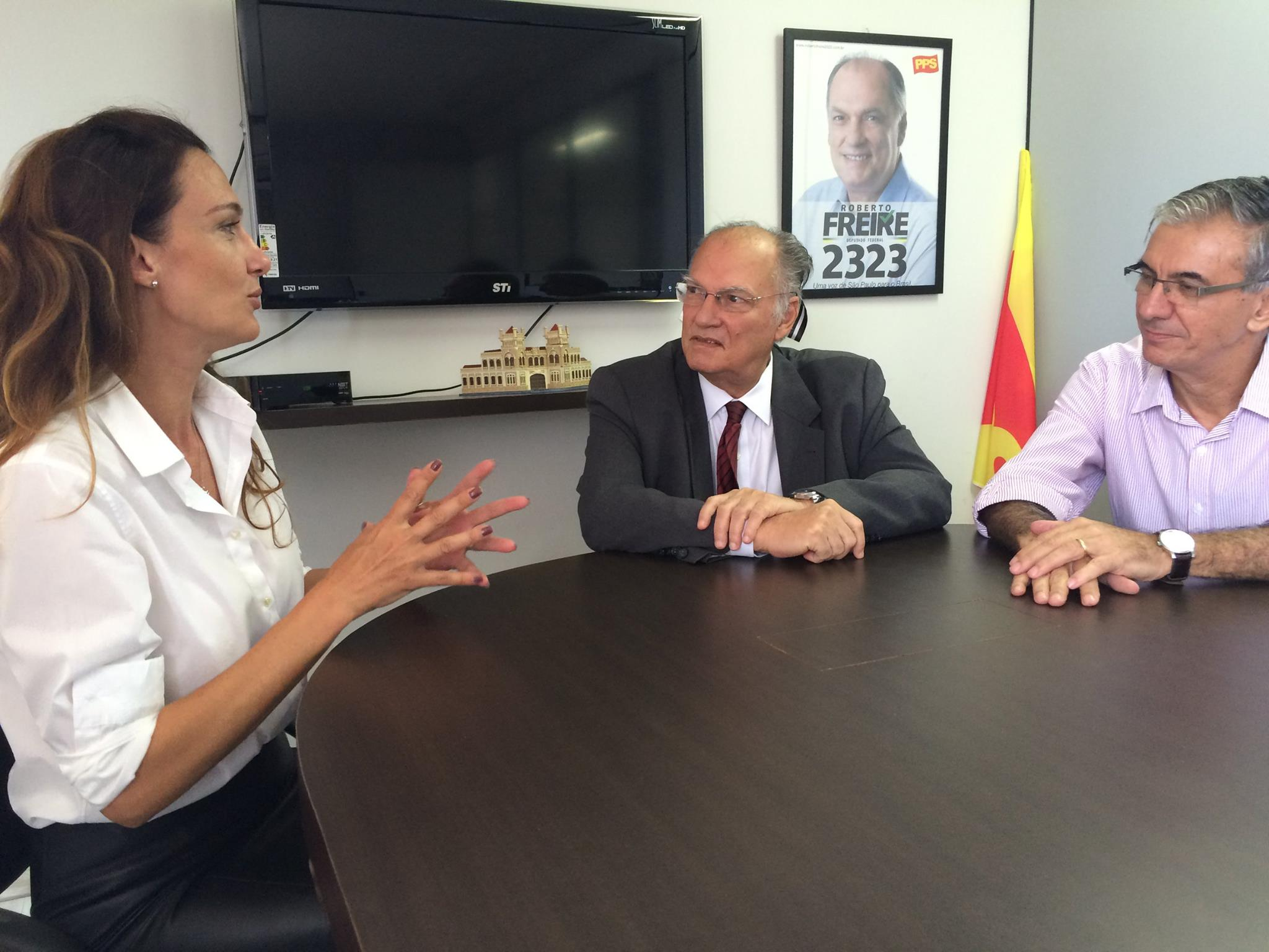 Alessandra Berriel participa de reunião com o deputado federal Roberto Freire (PPS), presidente nacional do partido, r com o deputado estadual Davi Zaia, presidente estadual do PPS.